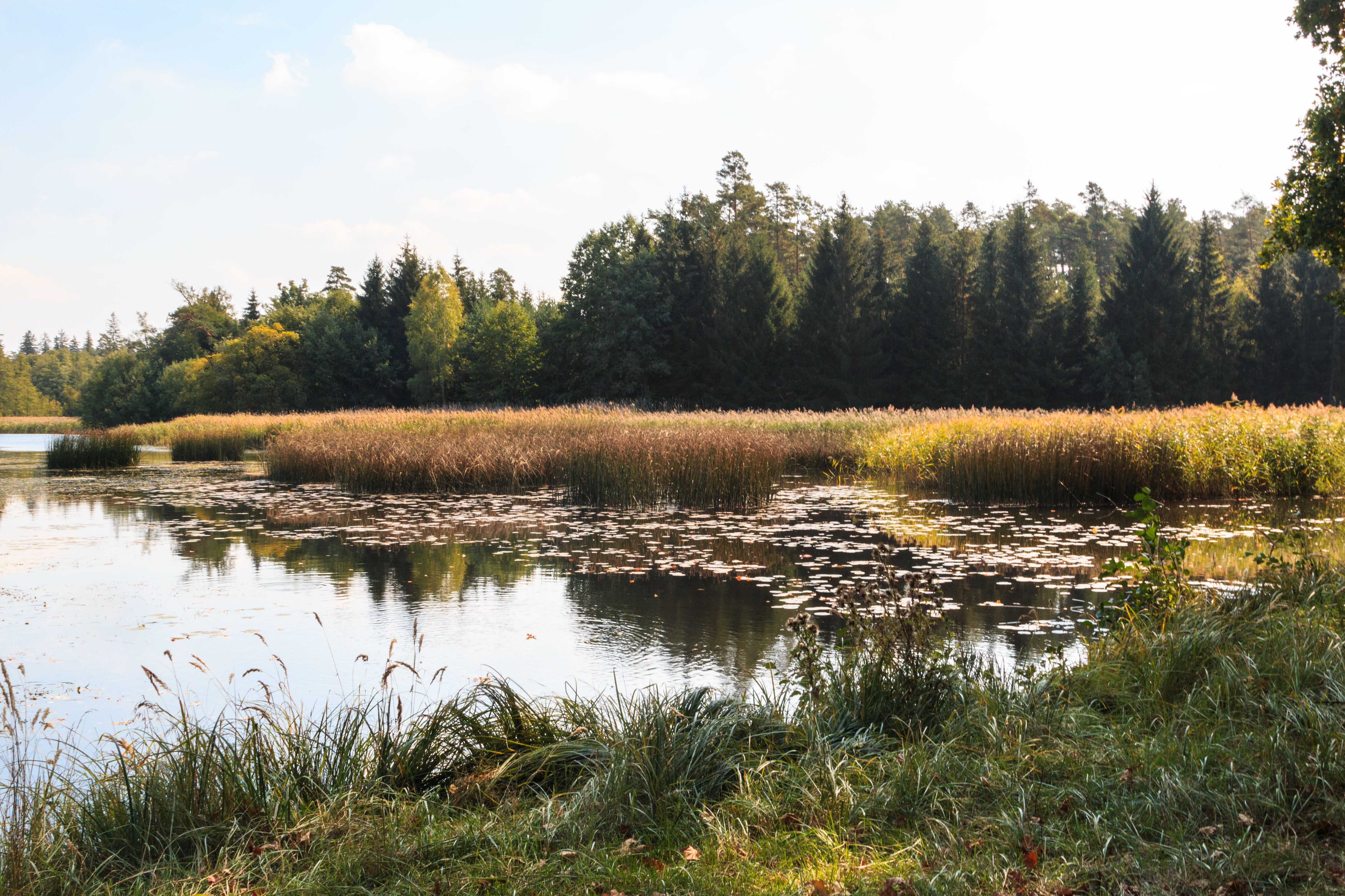 Vavrouškův rybník u Hradčan Project: Vodstvo.